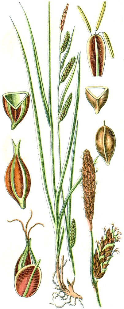 Carex binervis, syn. Carex distans subsp. binervis